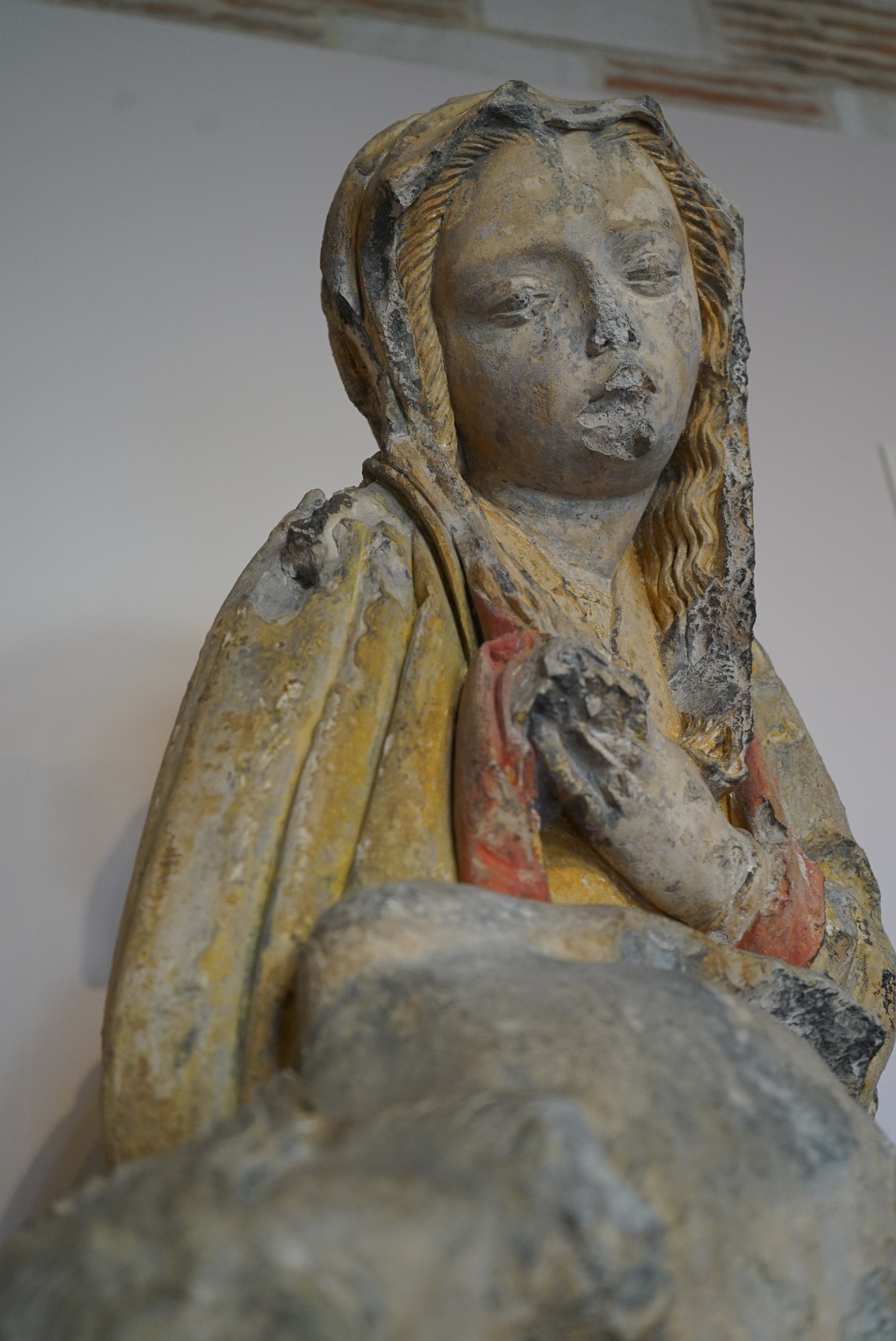 sculpture au musée Vauluisant.